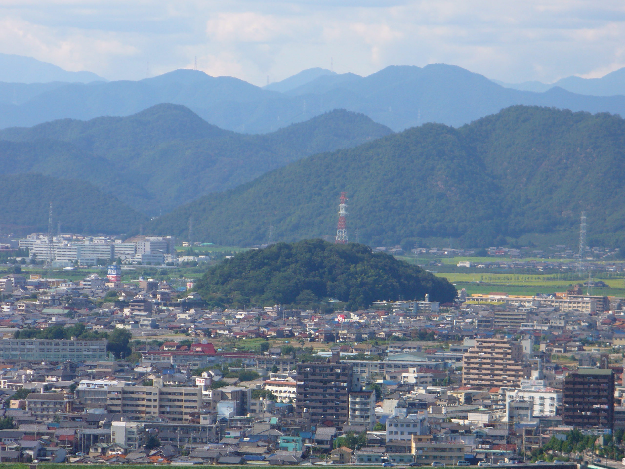 Sagiyama Castle（鷺山城）,Gifu,Gifu,Japan（岐阜県岐阜市）で撮影。金華山ドライブウェイの金華山展望台より。